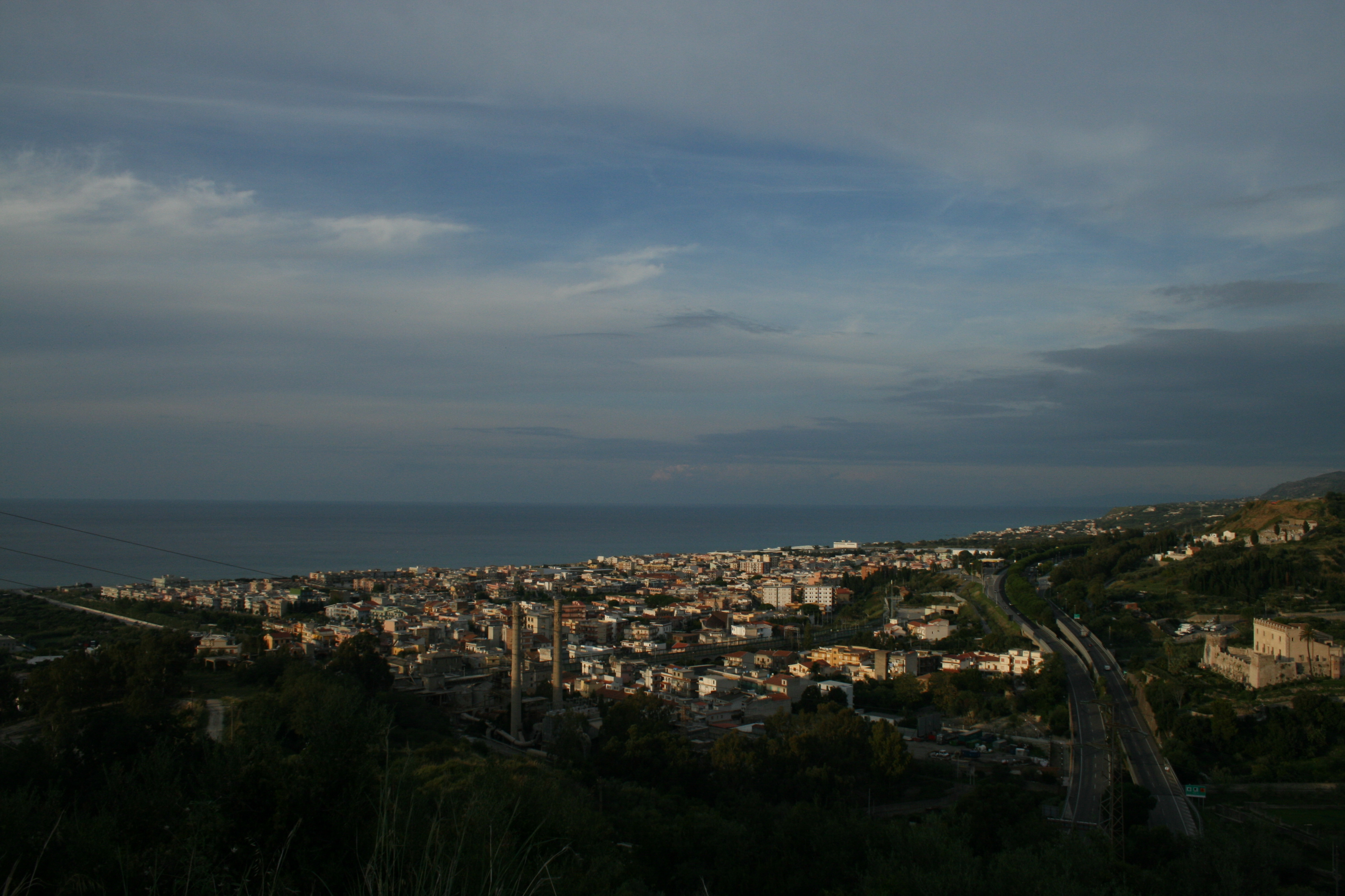 vista da collina sovrastante il centro abitato